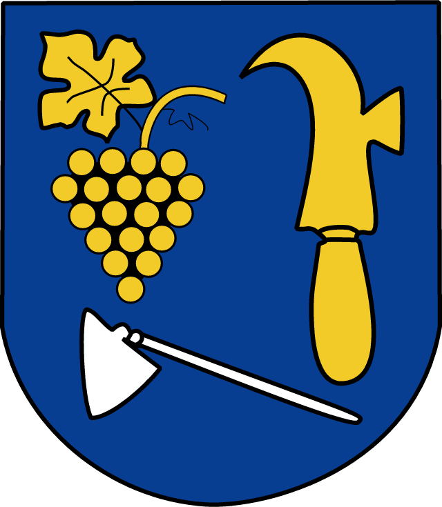 Erb obce Dvorníky. Je na nom motyka, strapec hrozna a kosák